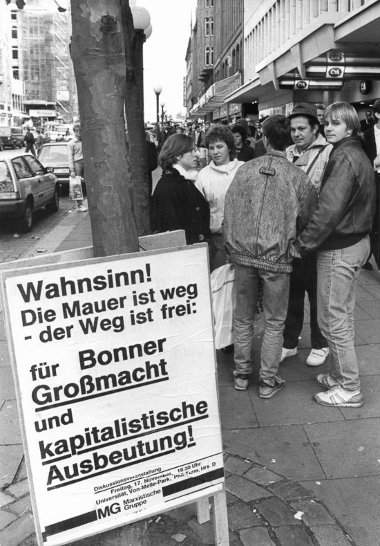 ADN-ZB Pätzold 12.11.89 BRD: Nicht ohne Bedenken wird in der BRD die neue Reiseregelung der DDR aufgenommen. Auf der Hamburger Steinstraße wird zu einer Diskussion eingeladen, die den Bonner Großmachtanspruch und die kapitalistische Ausbeutung zum Inhalt haben.